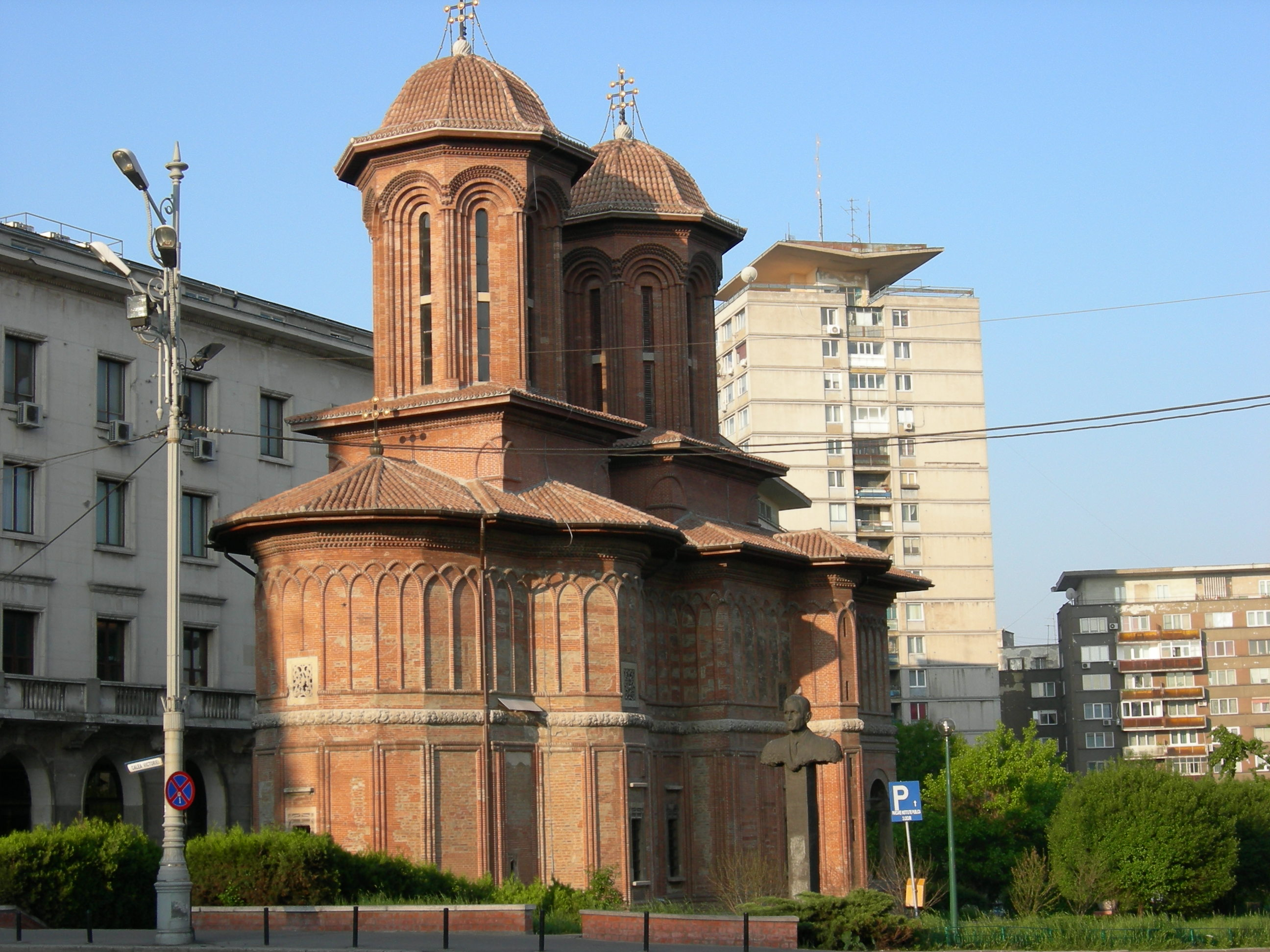 Creţulescu Church (also sometimes spelled Kretsulescu), Calea Victoriei, Bucharest, Romania